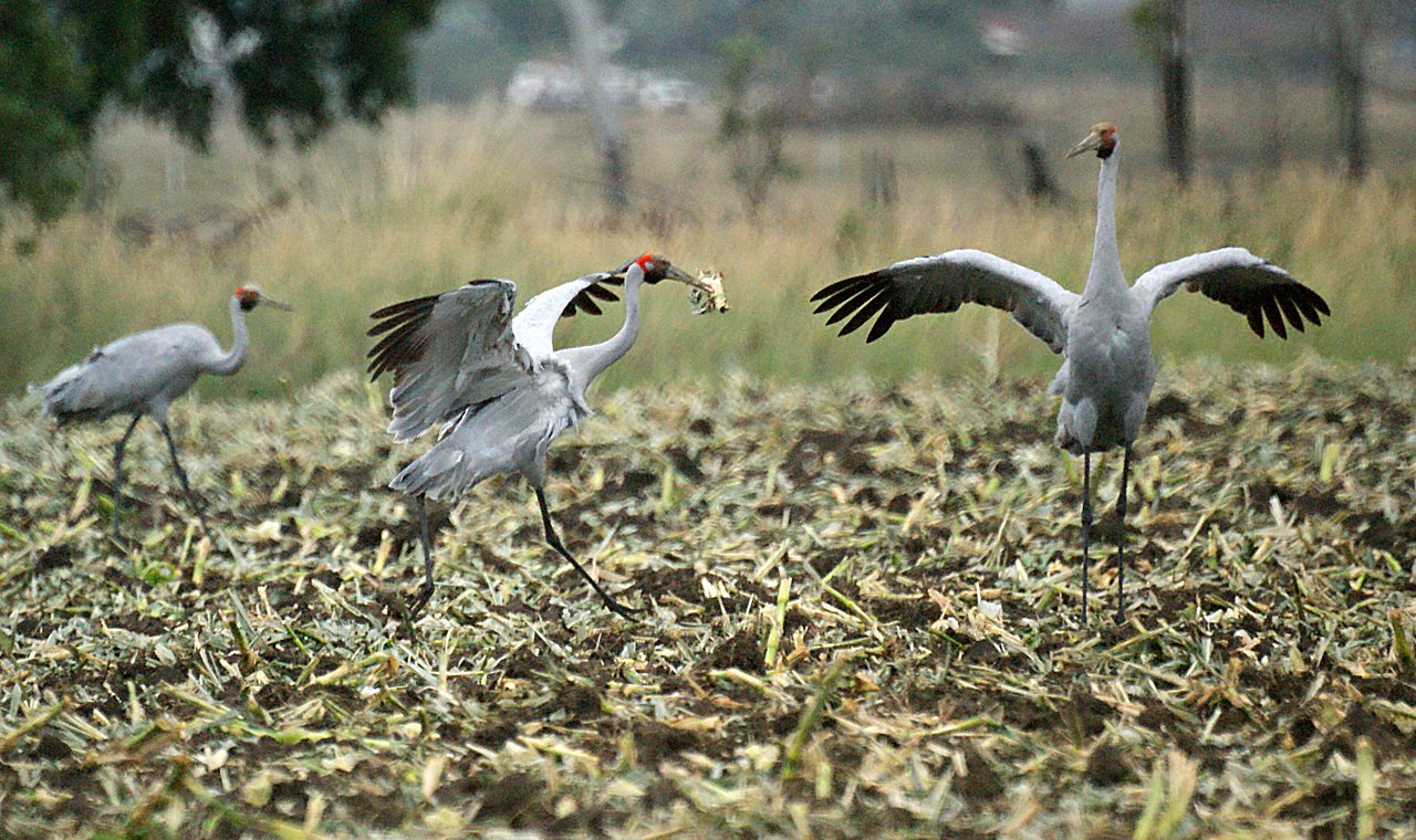 Brolga (Grus rubicunda) Bowen Qld DSC02867